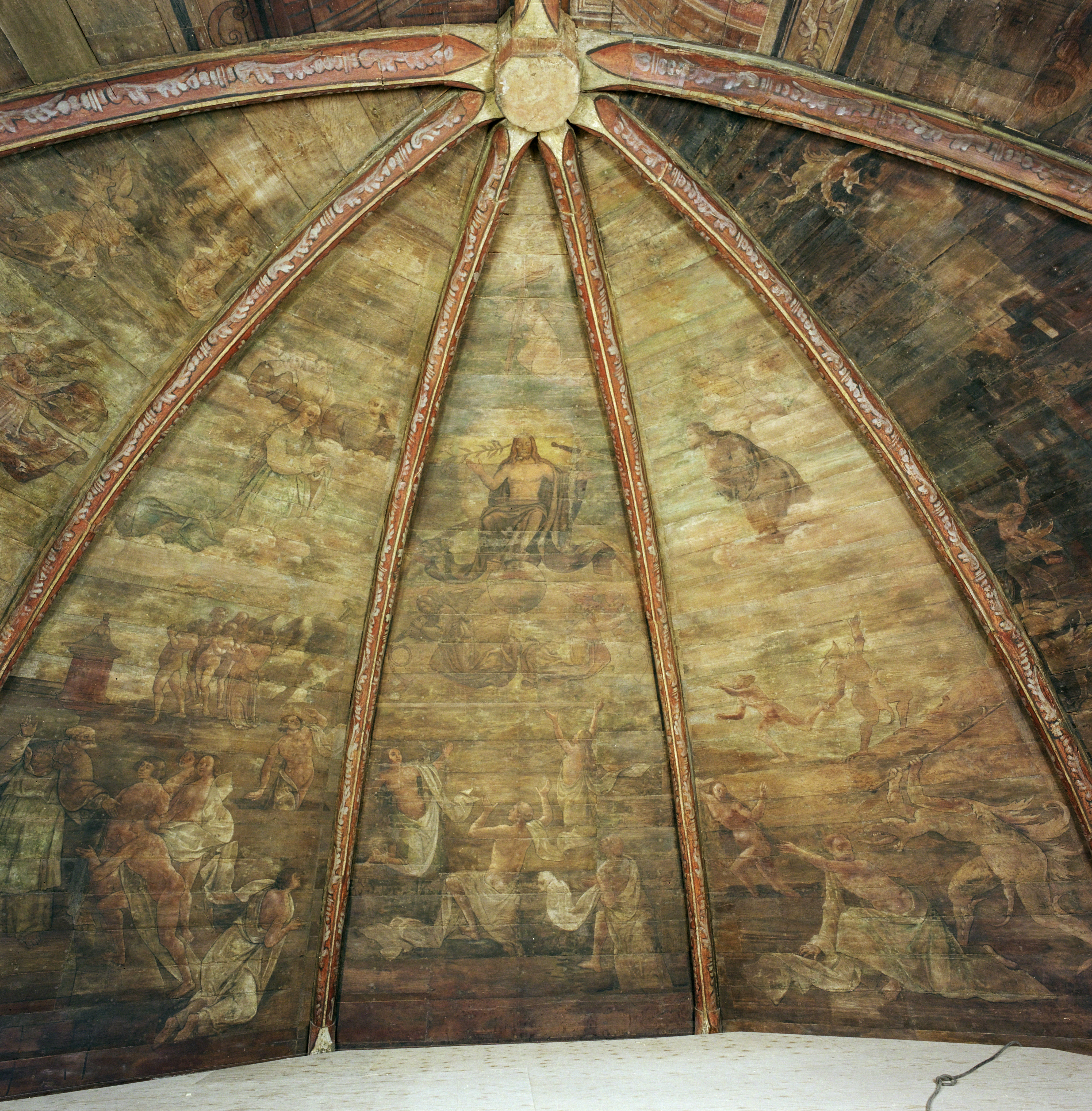 Nederlands Hervormde Kerk: Interieur koor, gewelfschilderingen, overzicht vak 1, 2 en 3, na restauratie